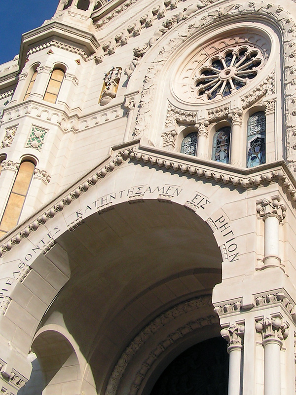 Reggio Calabria chatedral